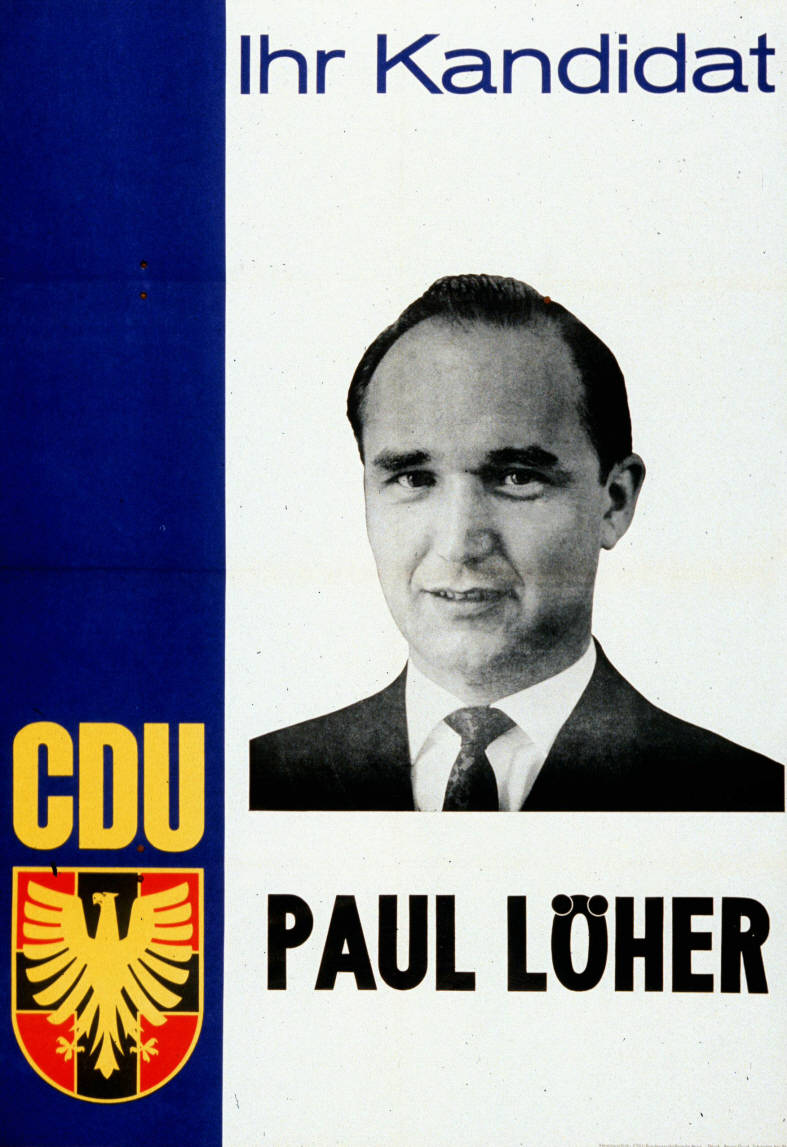 Ihr Kandidat Abbildung: Porträtfoto Plakatart: Kandidaten-/Personenplakat mit Porträt Auftraggeber: Verantw.: CDU-Bundesgeschäftsstelle Bonn Drucker_Druckart_Druckort: Repro-Druck, Schmiden bei Stuttgart Objekt-Signatur: 10-001: 1041 Bestand: Plakate zu Bundestagswahlen (10-001) GliederungBestand10-18: Plakate zu Bundestagswahlen (10-001) » Die 4. Bundestagswahl am 17. September 1961 » CDU » Mit Porträtfoto Lizenz: KAS/ACDP 10-001: 1041 CC-BY-SA 3.0 DE